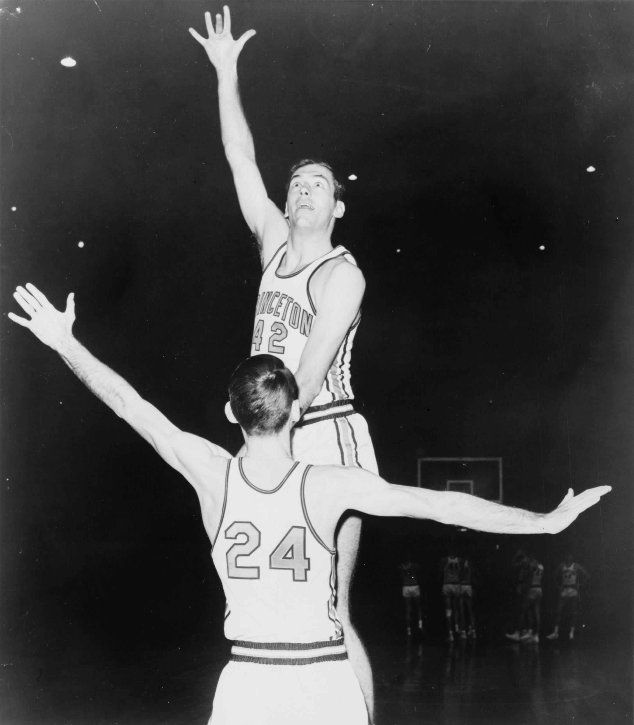 Bill Bradley playing basketball